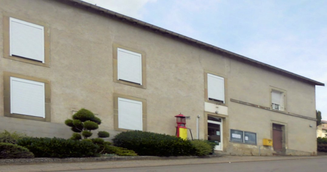 La mairie de Saint-Remimont